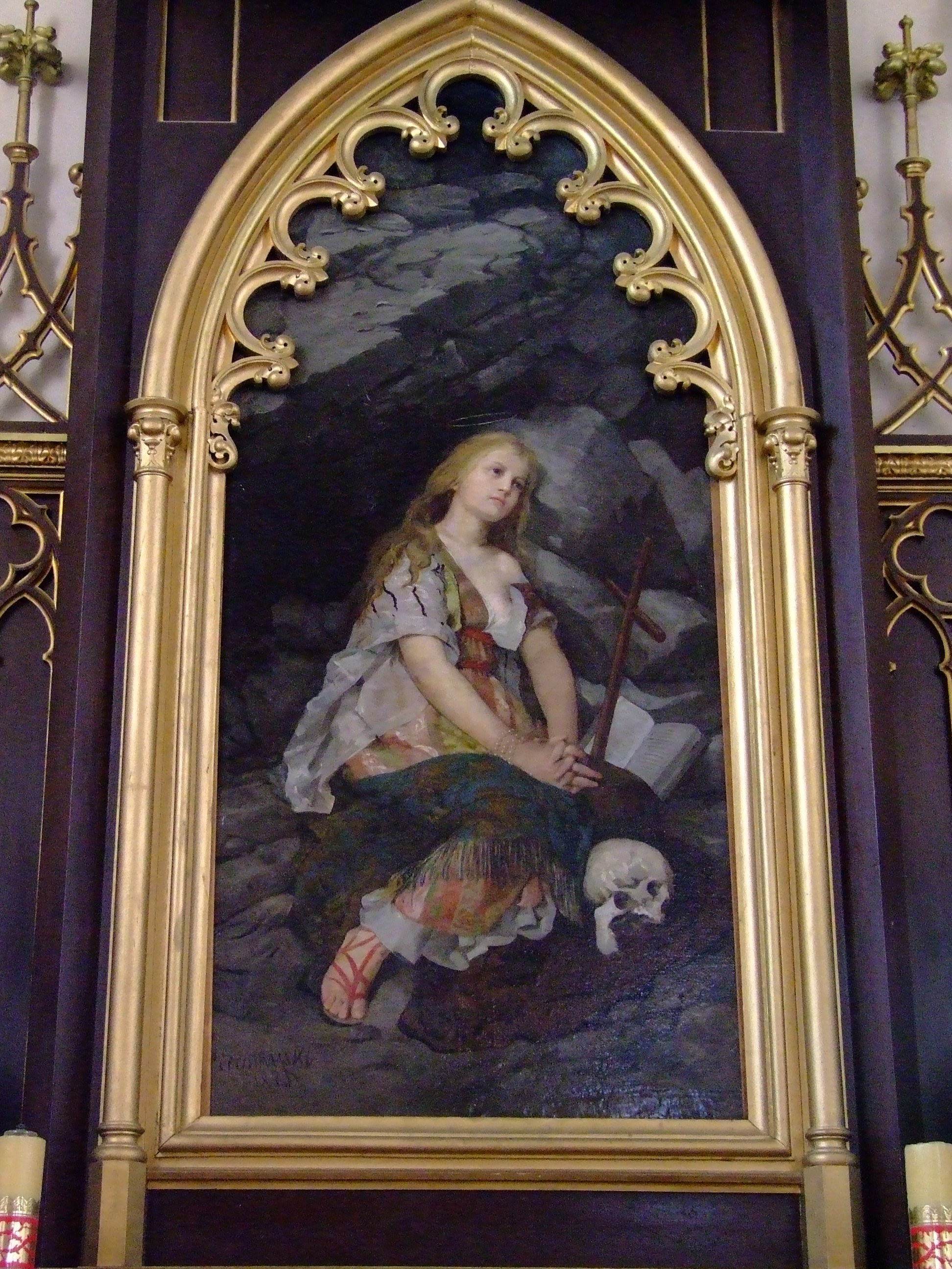 Szydłowo kościół